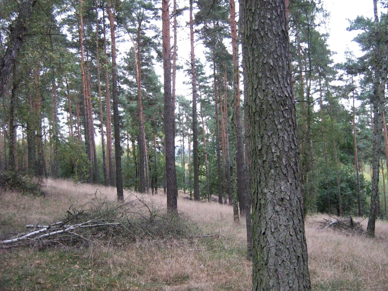 Pinus sylvestris (Gemeine Kiefer) - lichtes Kiefernaltholz am Wietkikenberg bei Ferch im Landkreis Potsdam-Mittelmark, Brandenburg.